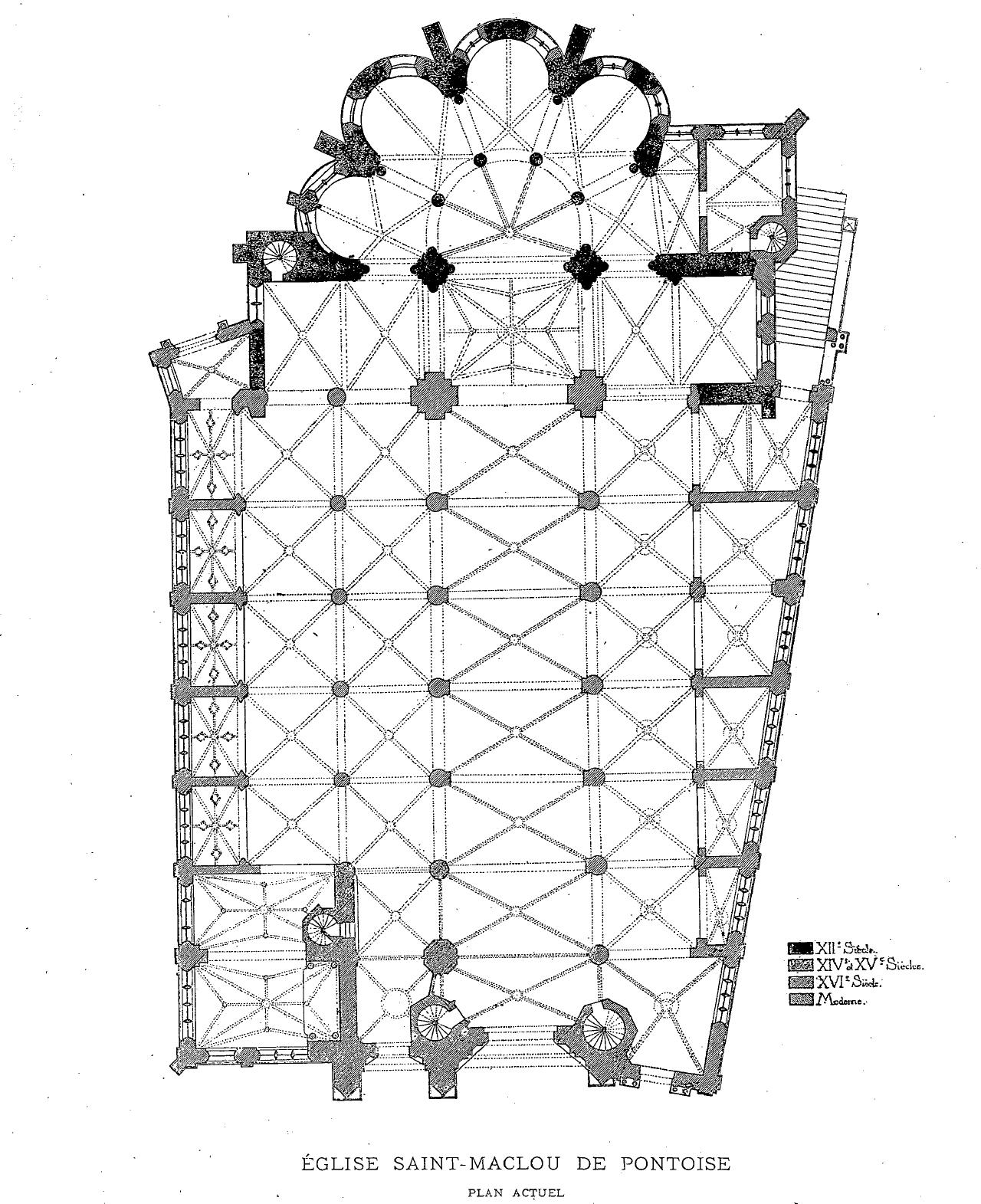 Plan actuel de l'église Saint-Maclou, correspondant à la situation depuis 1585.